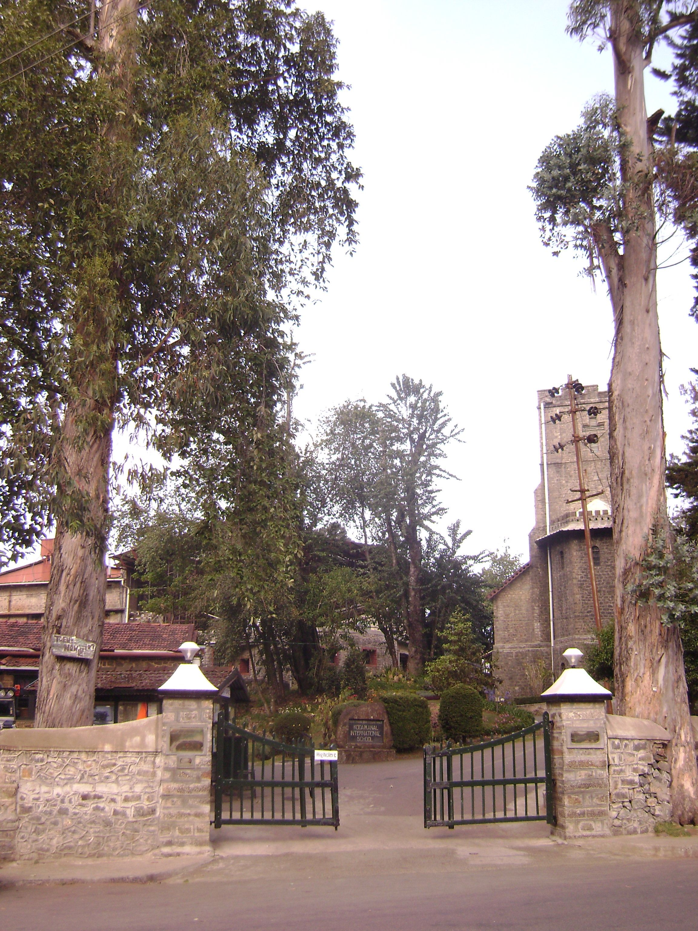 Kodaikanal International School gate